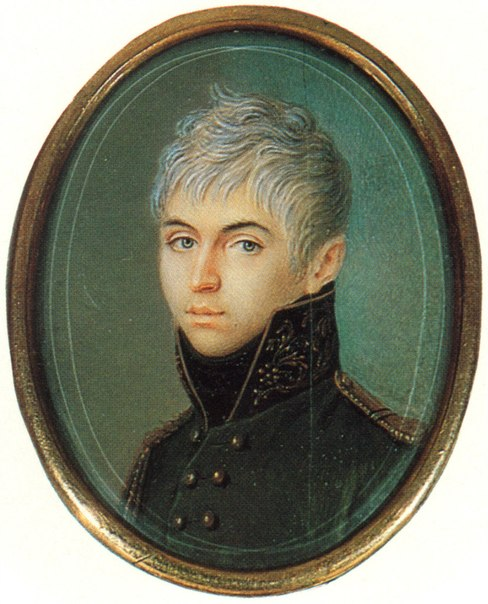 Иван Паскевич (?) в молодости